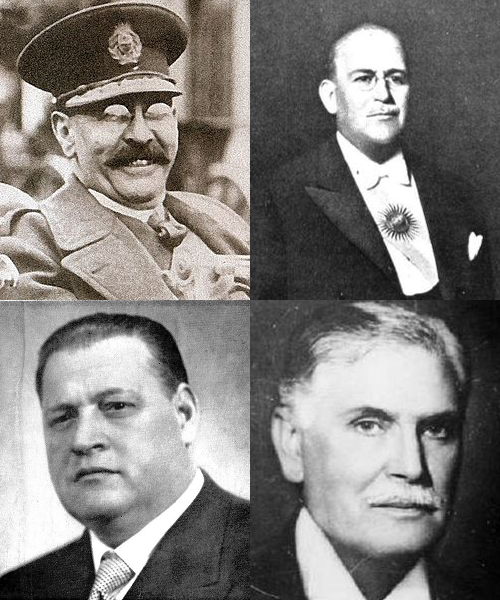 Los cuatro presidentes de la Década Infame. Foto creada para utilizar en el artículo Década Infame en la Wikipedia en español.